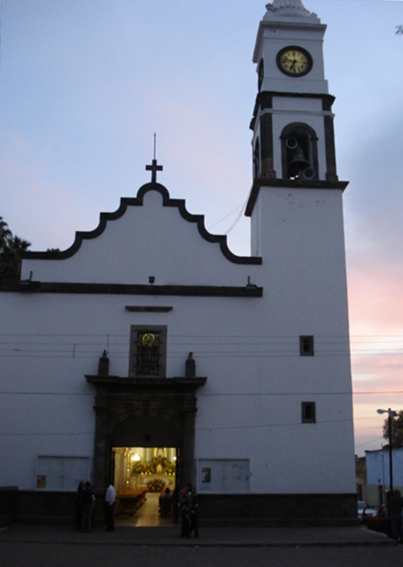 Iglesia construida entre los anos 1600 a 1900, no se sabe la fecha exacta de su construcción, pero ha tenido varias remodelaciones. por lo que no aparenta la edad anteriormente dicha.